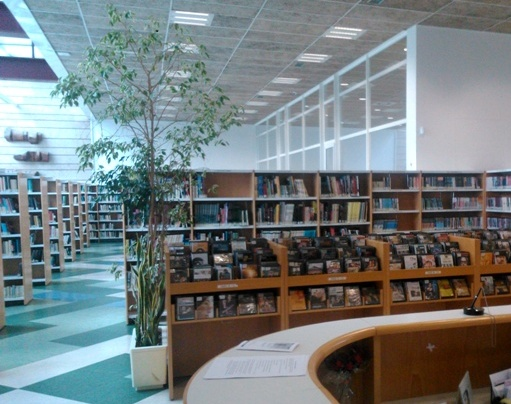 Servicio de Préstamo de Adultos de la Biblioteca Pública Bances Candamo de Avilés.